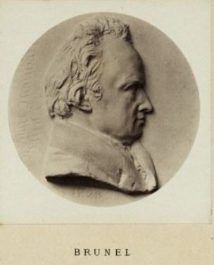 Isambard Kingdom Brunel (1806-1859) in Les médaillons de David d'Angers réunis et publiés par son fils Robert David d'Angers, 1867 (BNF/Gallica)